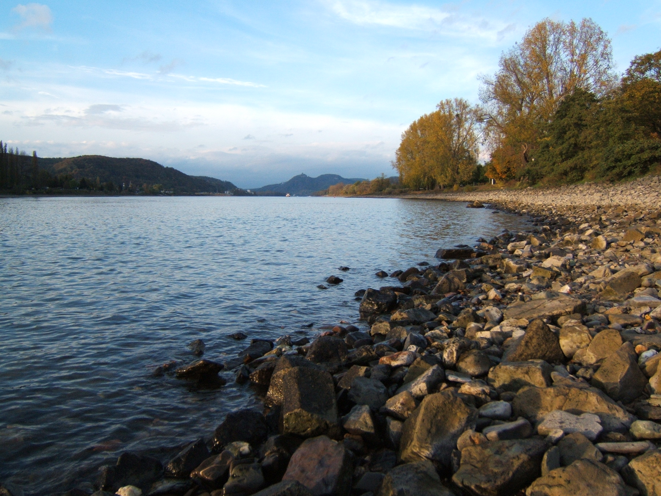 Rhein bei Unkel am 25.10.2005 Autor: Nicolas Scheuer